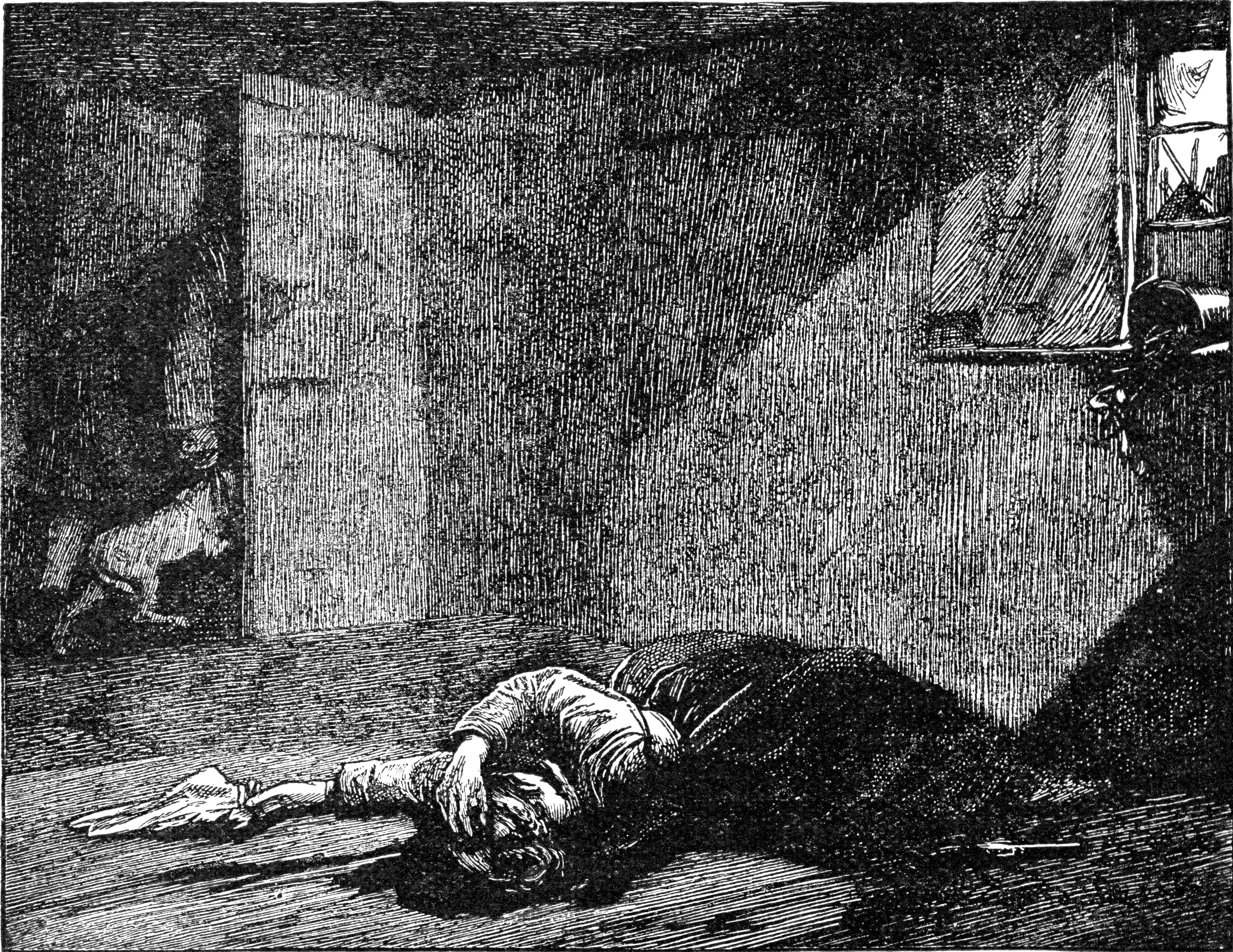 Illustration på sida 234 ur boken Oliver Twist: Samhällsroman från 1898